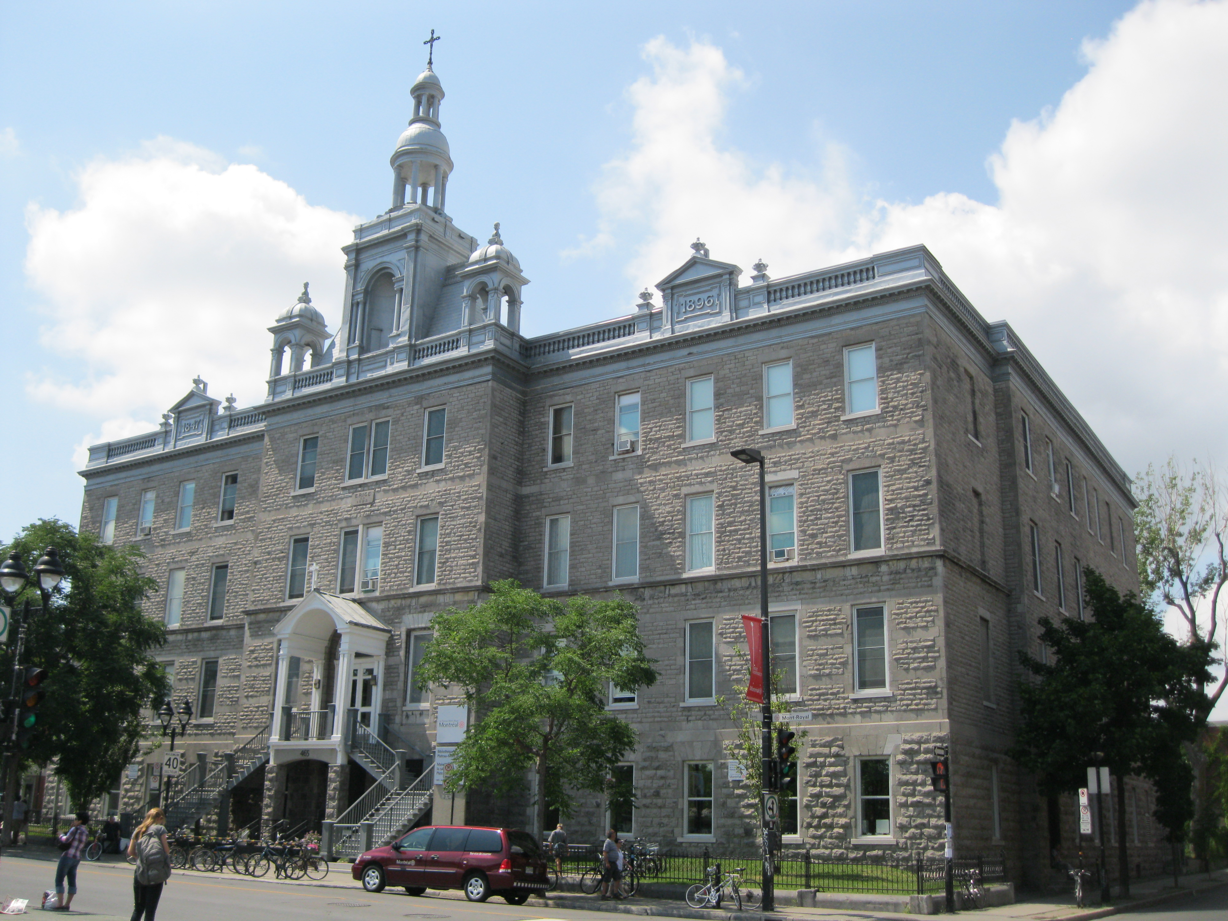 Ancien Pensionnat Saint-Basile. Aujourd'hui se trouve au rez-de-chaussée la bibliothèque et maison de la culture du Plateau-Mont-Royal, alors que les étages servent d'habitation pour des personnes âgées.